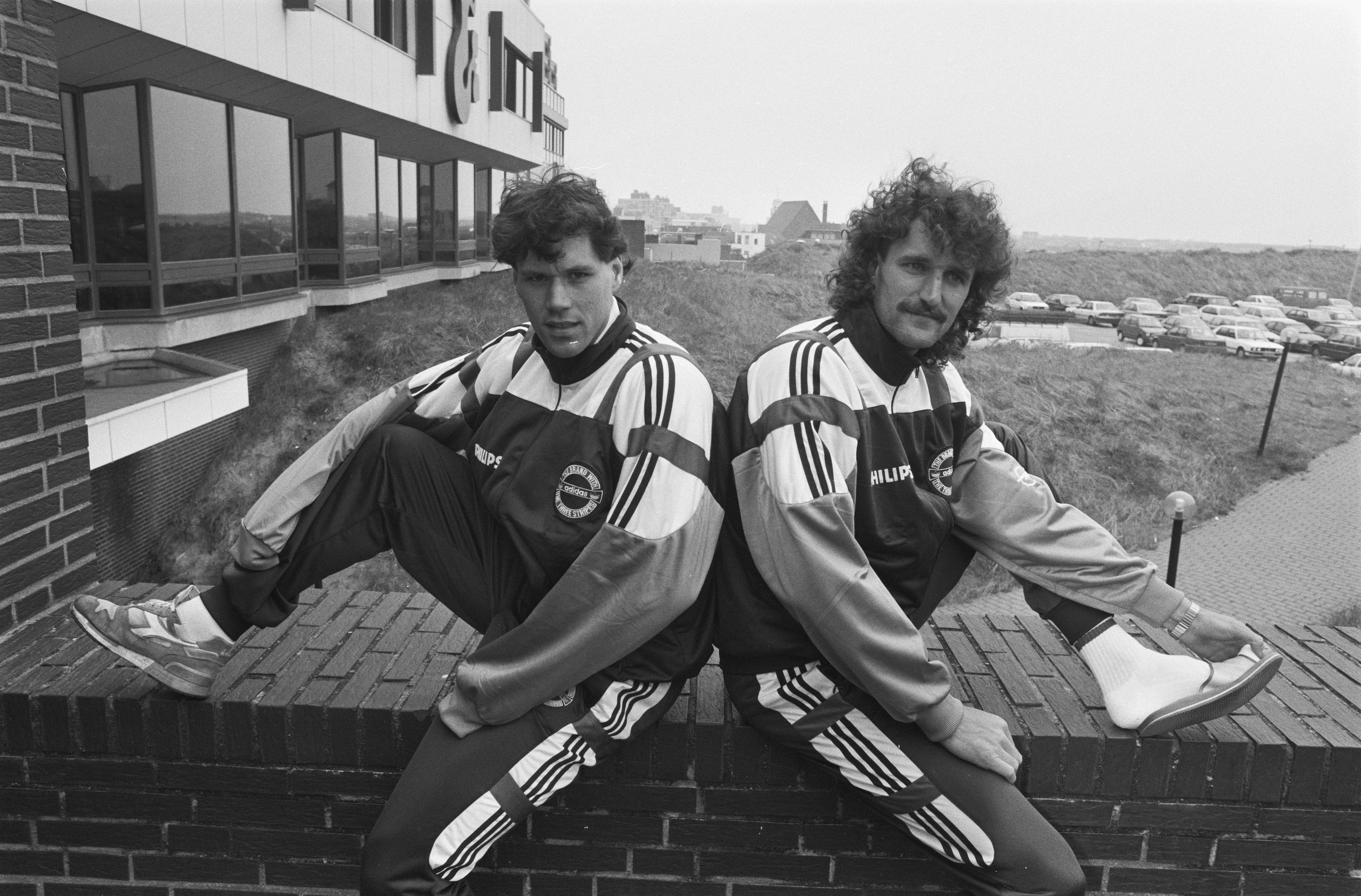 Collectie / Archief : Fotocollectie Anefo Reportage / Serie : Selectie Nederlands elftal bijeen in Noordwijk Beschrijving : Marco van Basten en René Eijkelkamp Datum : 21 april 1989 Locatie : Noordwijk, Zuid-Holland Trefwoorden : sport, voetbal Persoonsnaam : Basten, Marco van, Eijkelkamp, René Fotograaf : Croes, Rob C. / Anefo Auteursrechthebbende : Nationaal Archief Materiaalsoort : Negatief (zwart/wit) Nummer archiefinventaris : bekijk toegang 2.24.01.05 Bestanddeelnummer : 934-4427